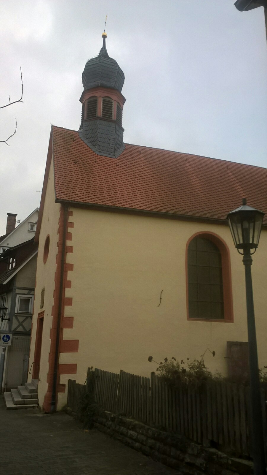 Die Blutskapelle (auch Kapelle zum heiligen Grab genannt) in Lauda von außen.